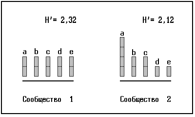 графічний приклад відмінностей показників різноманіття для різної вирівненості однакових за багатством сукупностей (оцінка за індексом Шеннона-Уївера). рисунок для ілюстрації оцінок біорізноманіття